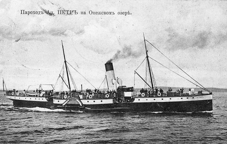 Пароход «Апостол Петр» на Онежском озере. Олонецкая губерния (1900-е годы)